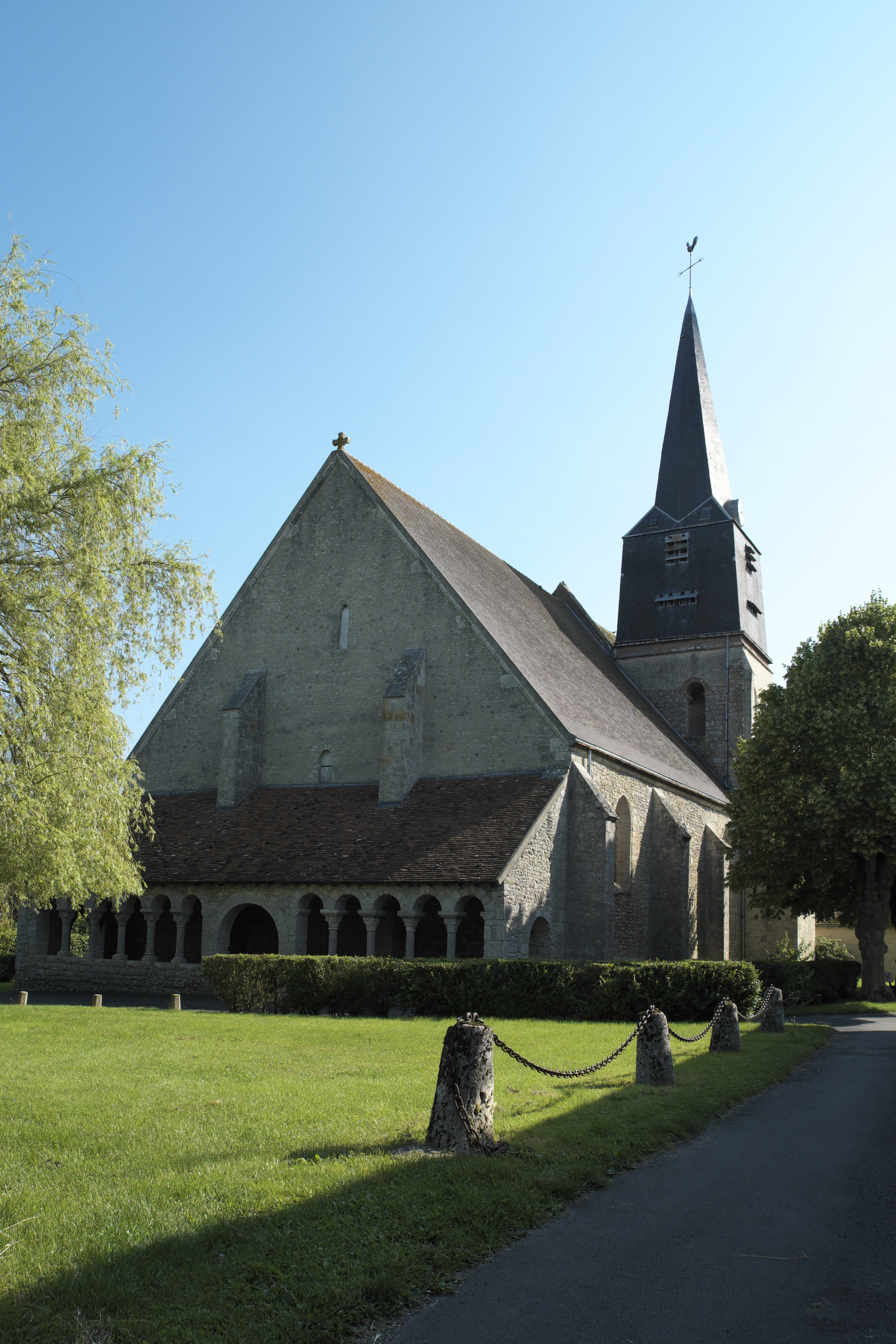 Kirche Saint-Germain in Boësses im Département Loiret (Région Centre/Frankreich)